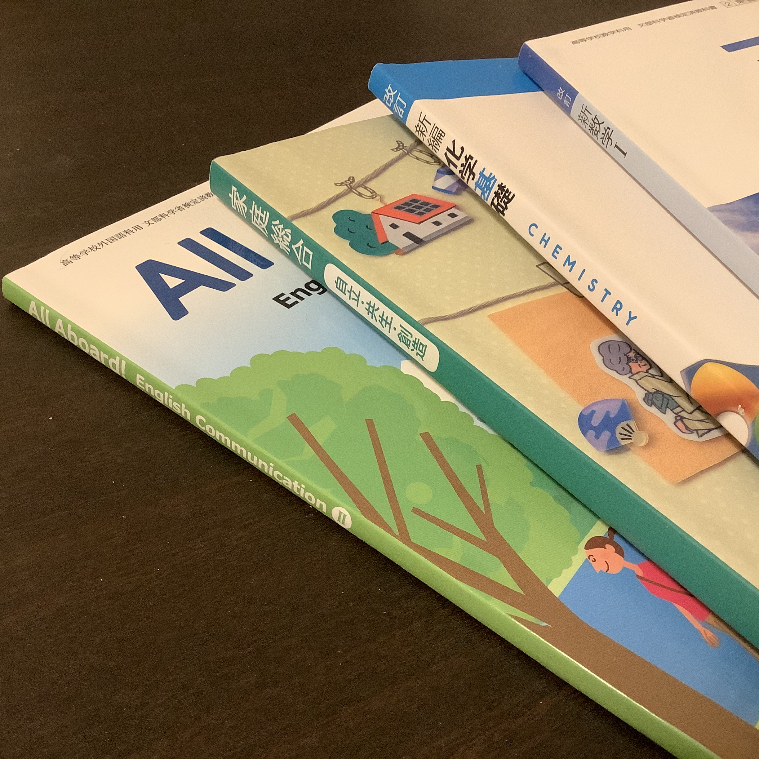 高等学校で使われている教科書の写真です。